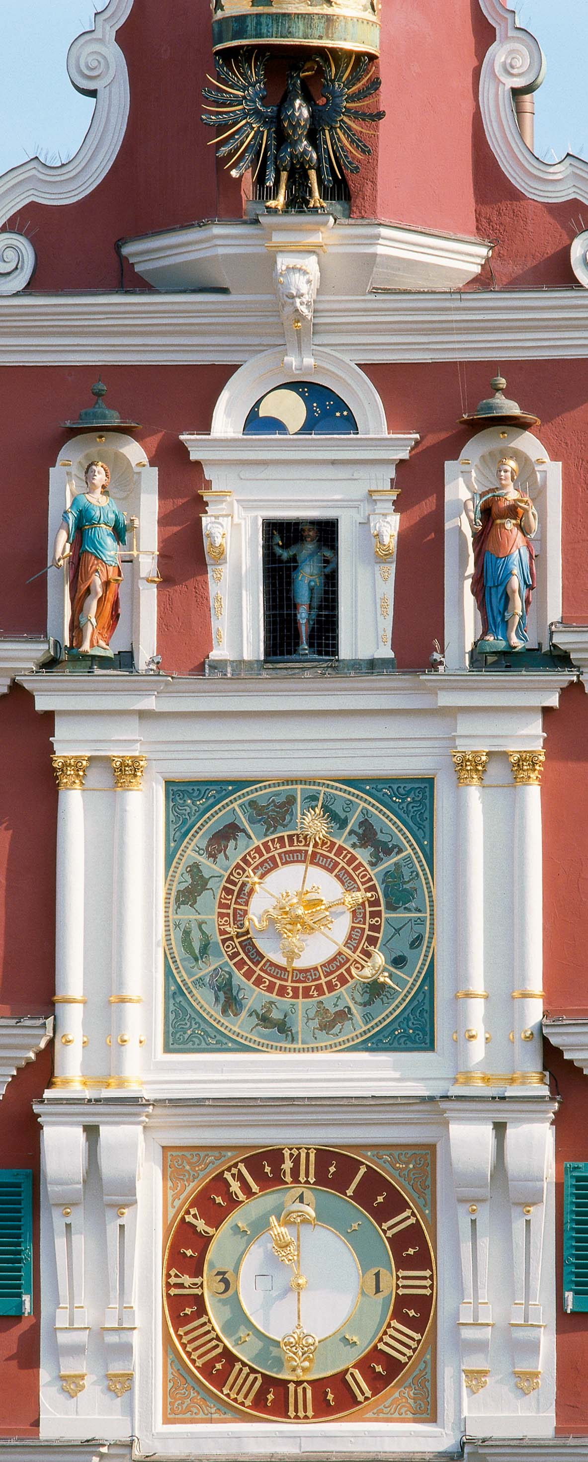 Uhr Fassade Altes Rathaus Esslingen